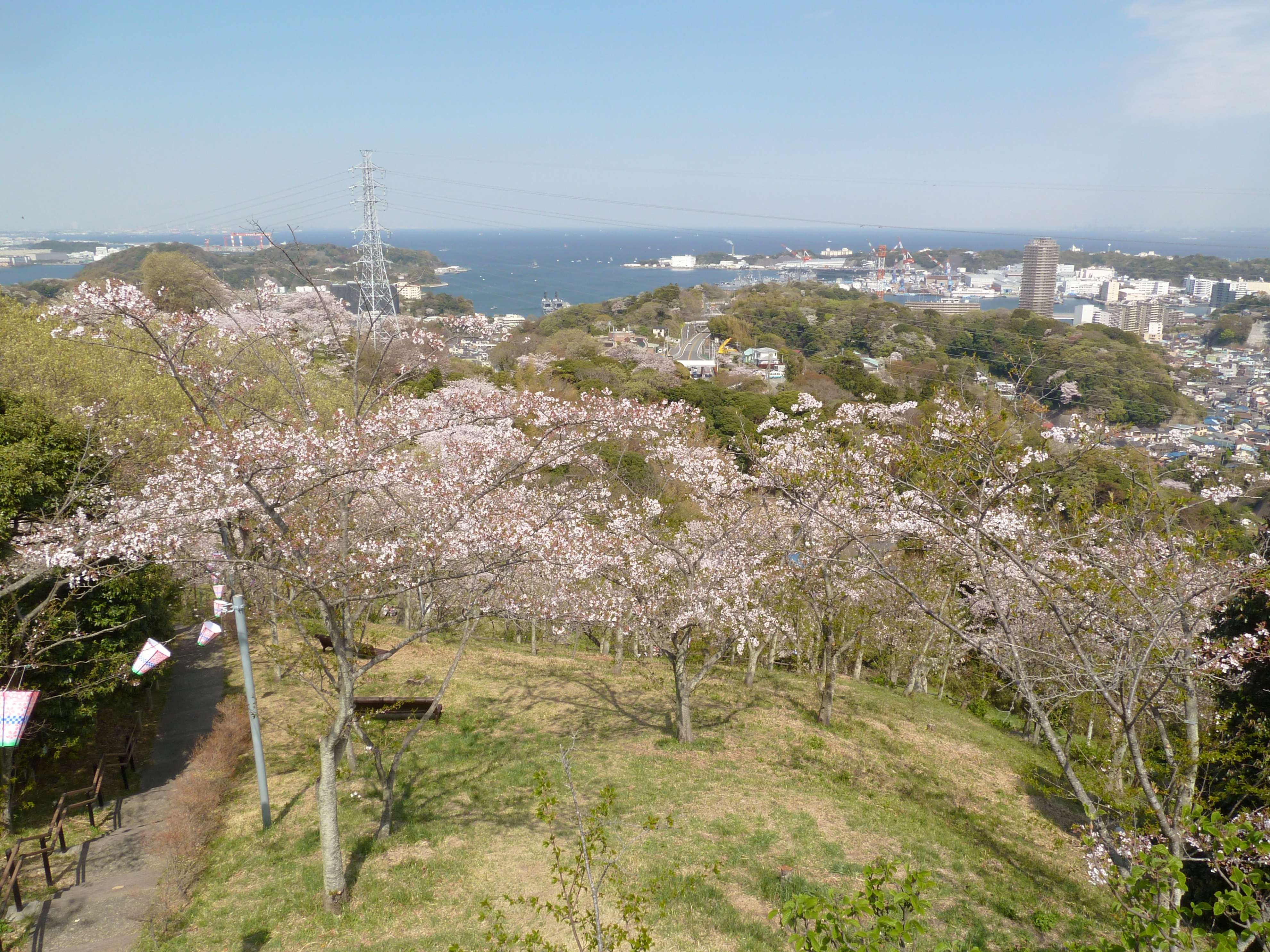 塚山公園の『見晴台』より横須賀港を望む（神奈川県横須賀市）